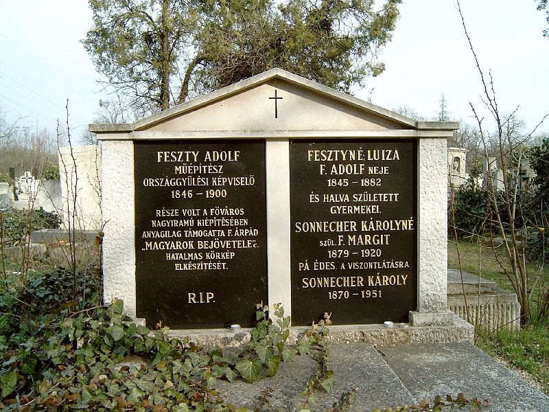 Feszty Adolf (Ógyalla, 1846. augusztus 17. – Budapest, 1900. február 26.) építész sírja Budapesten. Új köztemető: 16/11-1-1/2